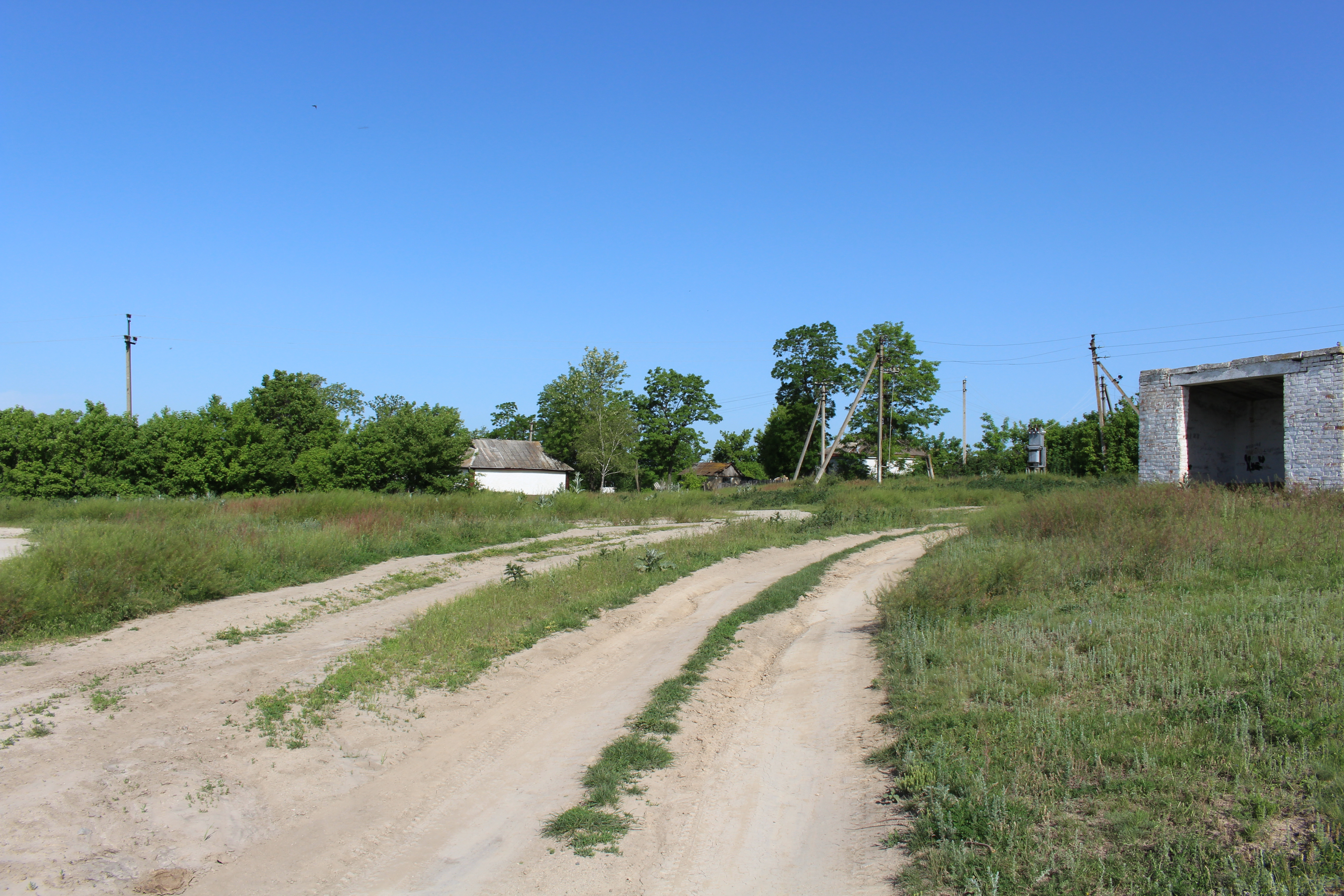 Початок села, заїзд зі сторони Якимівки. Вправо - друга частина Межового.